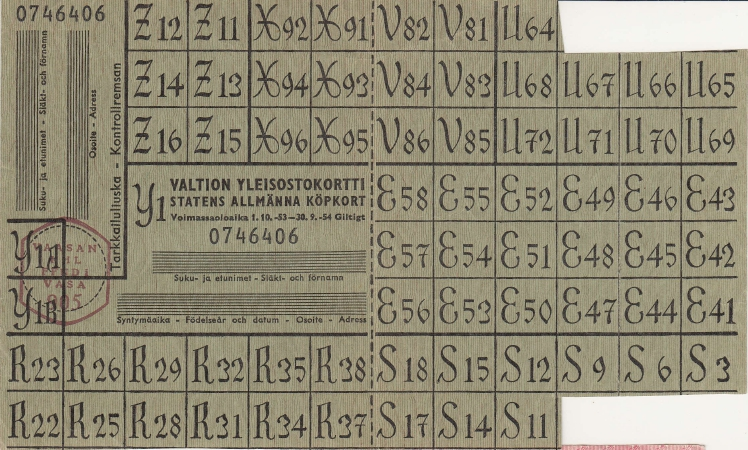 Ration stamp from Finland 1953.